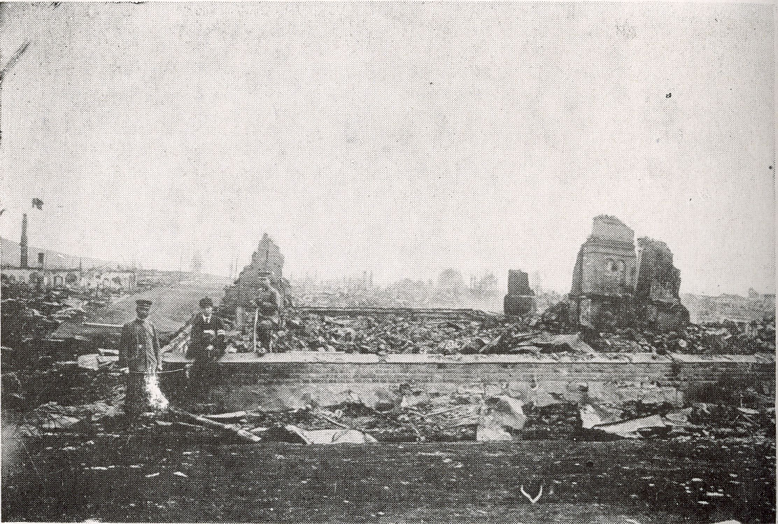 廃墟となった尼港（尼港事件）